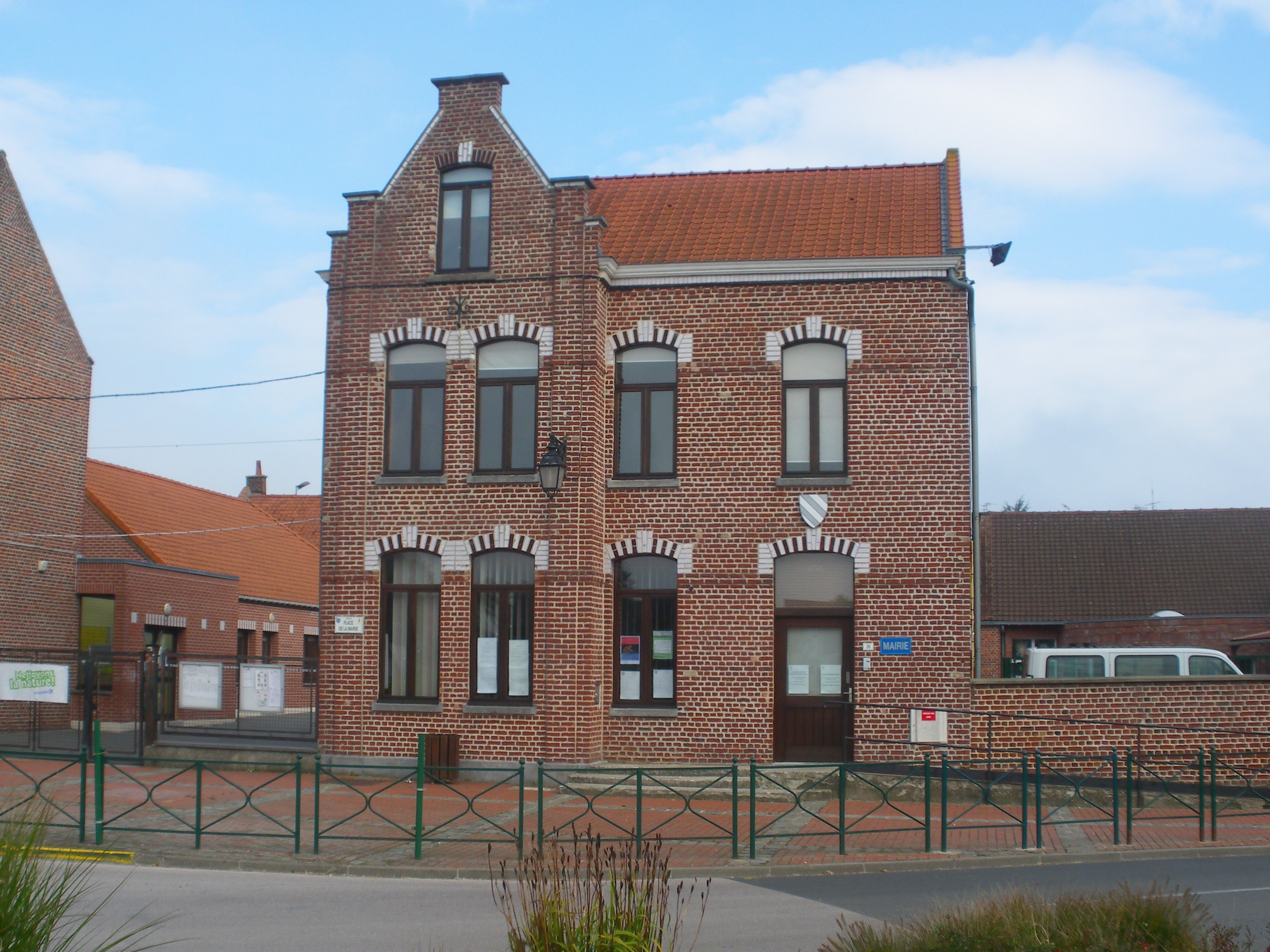 Vue de la mairie de Wannehain.